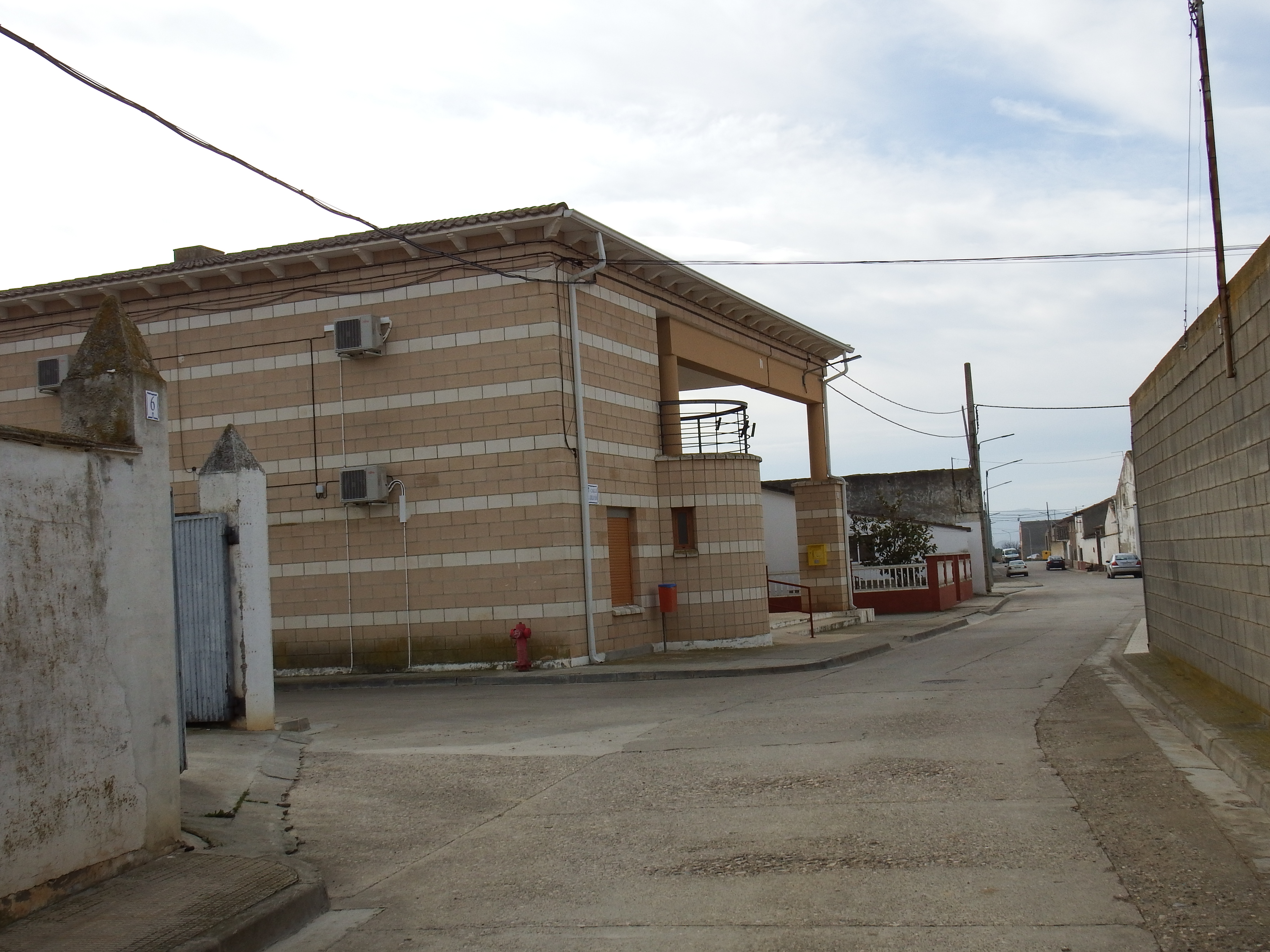 Albalatillo